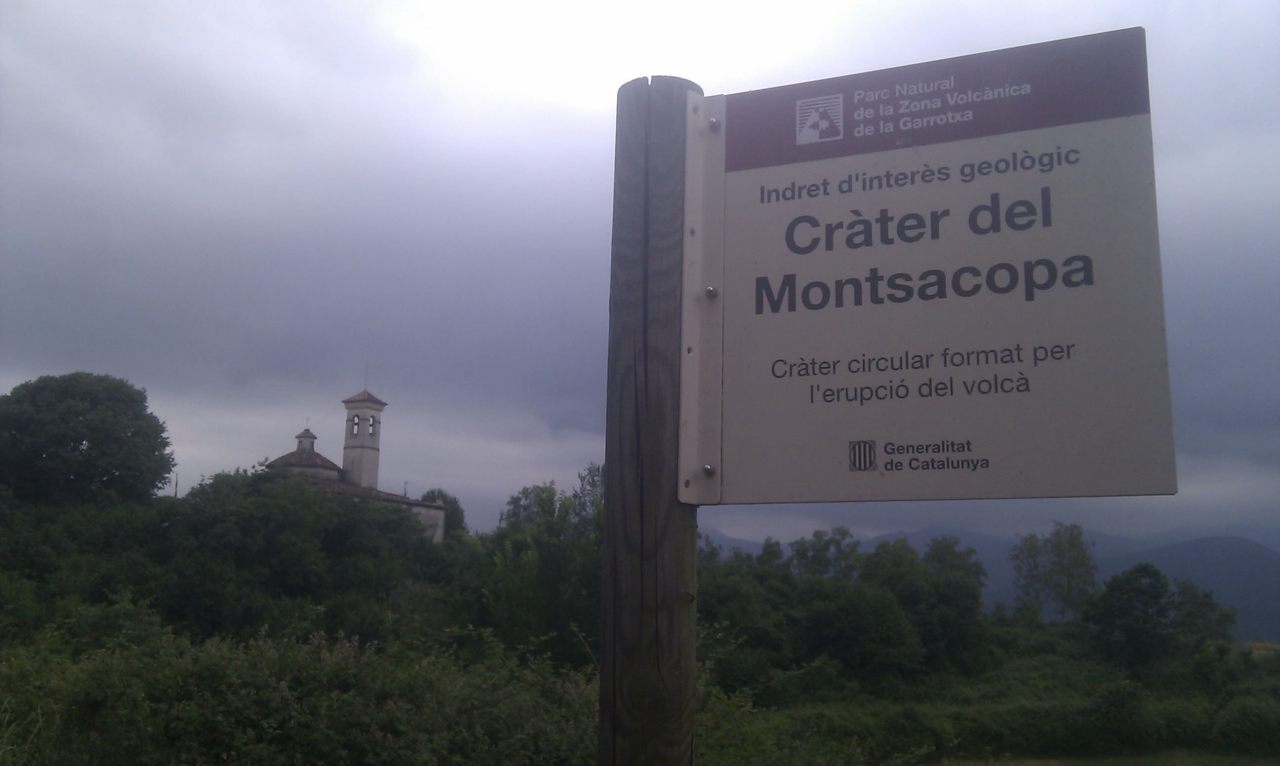 Església de Sant Francesc (Olot)